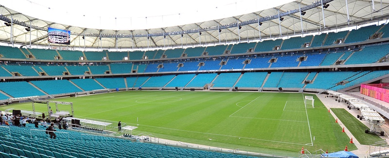 Panorama da Arena Fonte Nova em Salvador, Bahia.